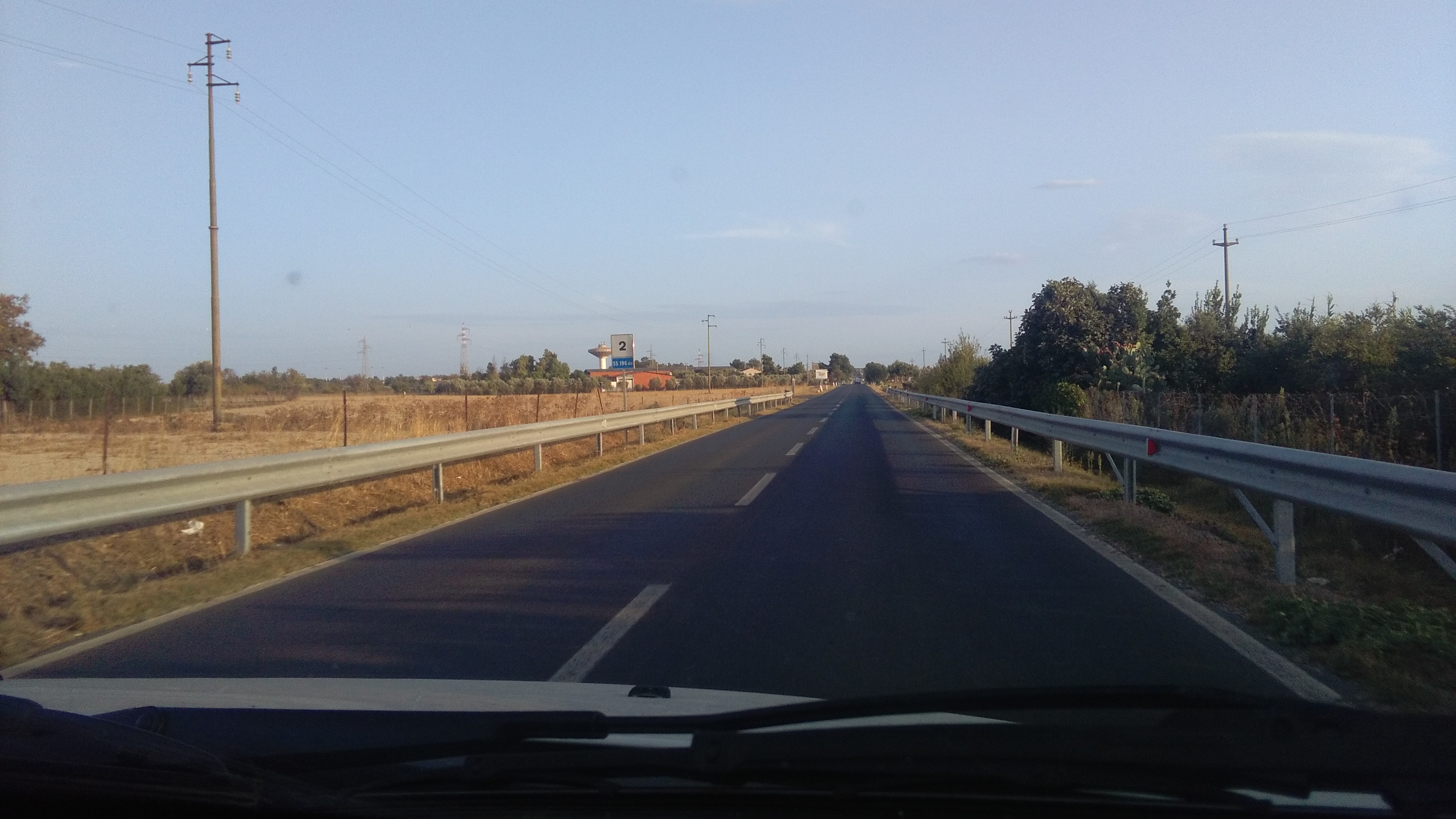 SS196 dir. Km. 2 direzione Villasor